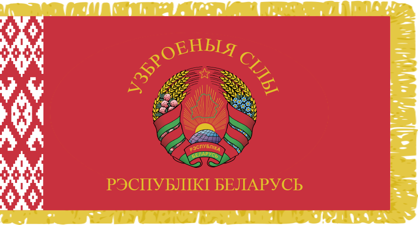 Сцяг Узброеных Сілаў Рэспублікі Беларусь